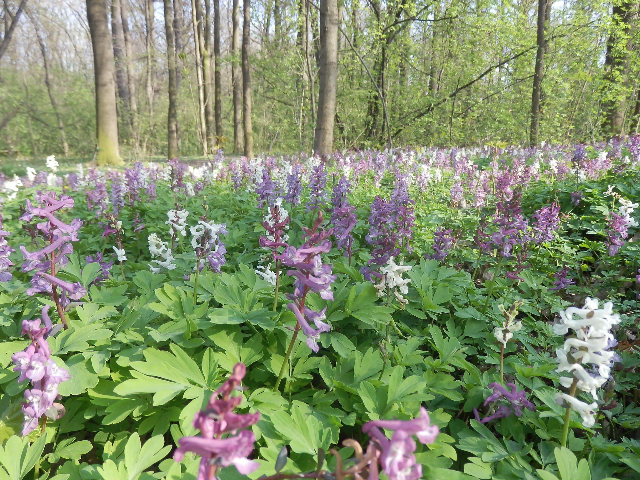 Dymnivka dutá (Corydalis cava), Obora v Uhříněvsi]